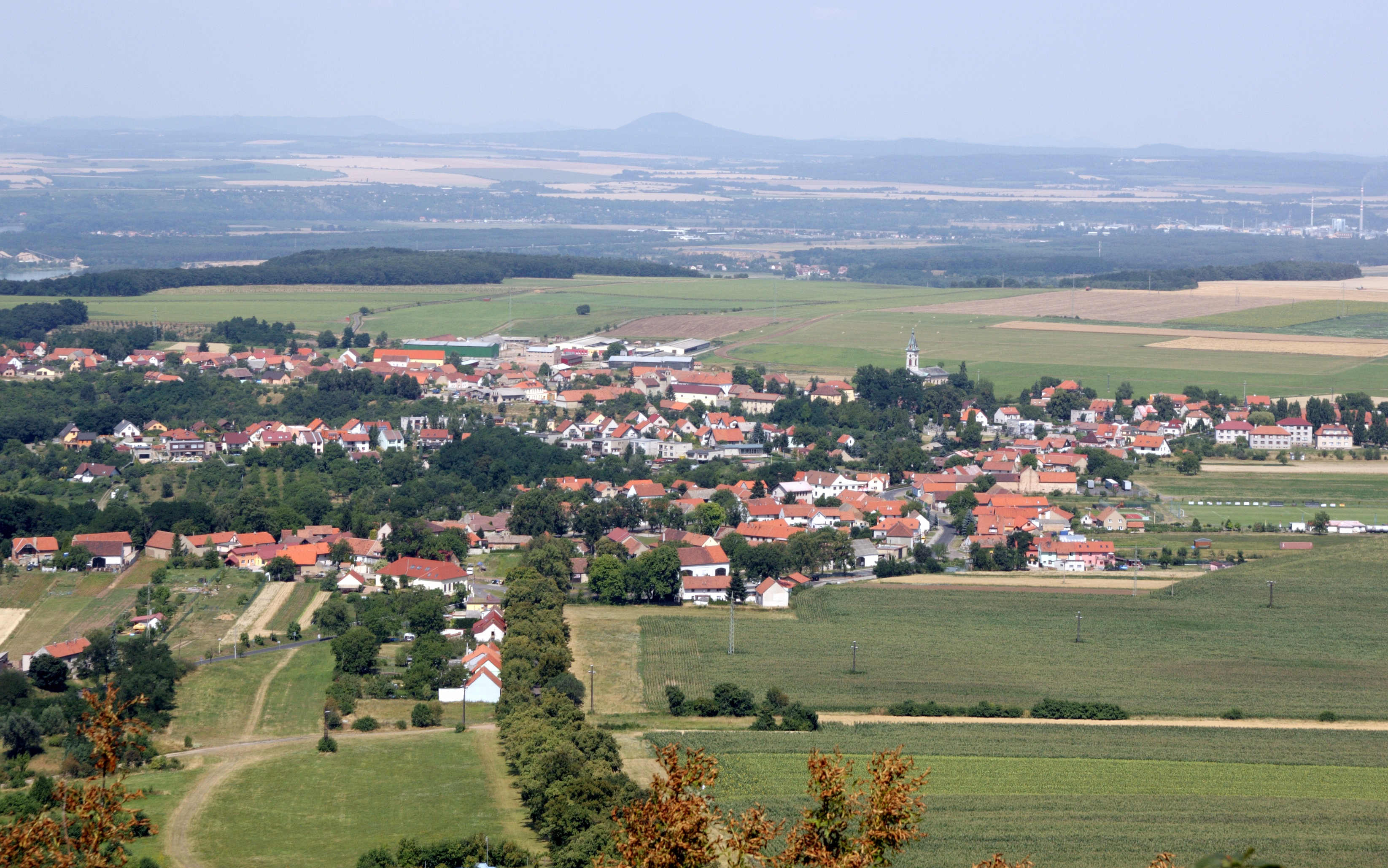 Obec Krabčice a místní část Rovné - pohled z Roudnické vyhlídky na Řípu.